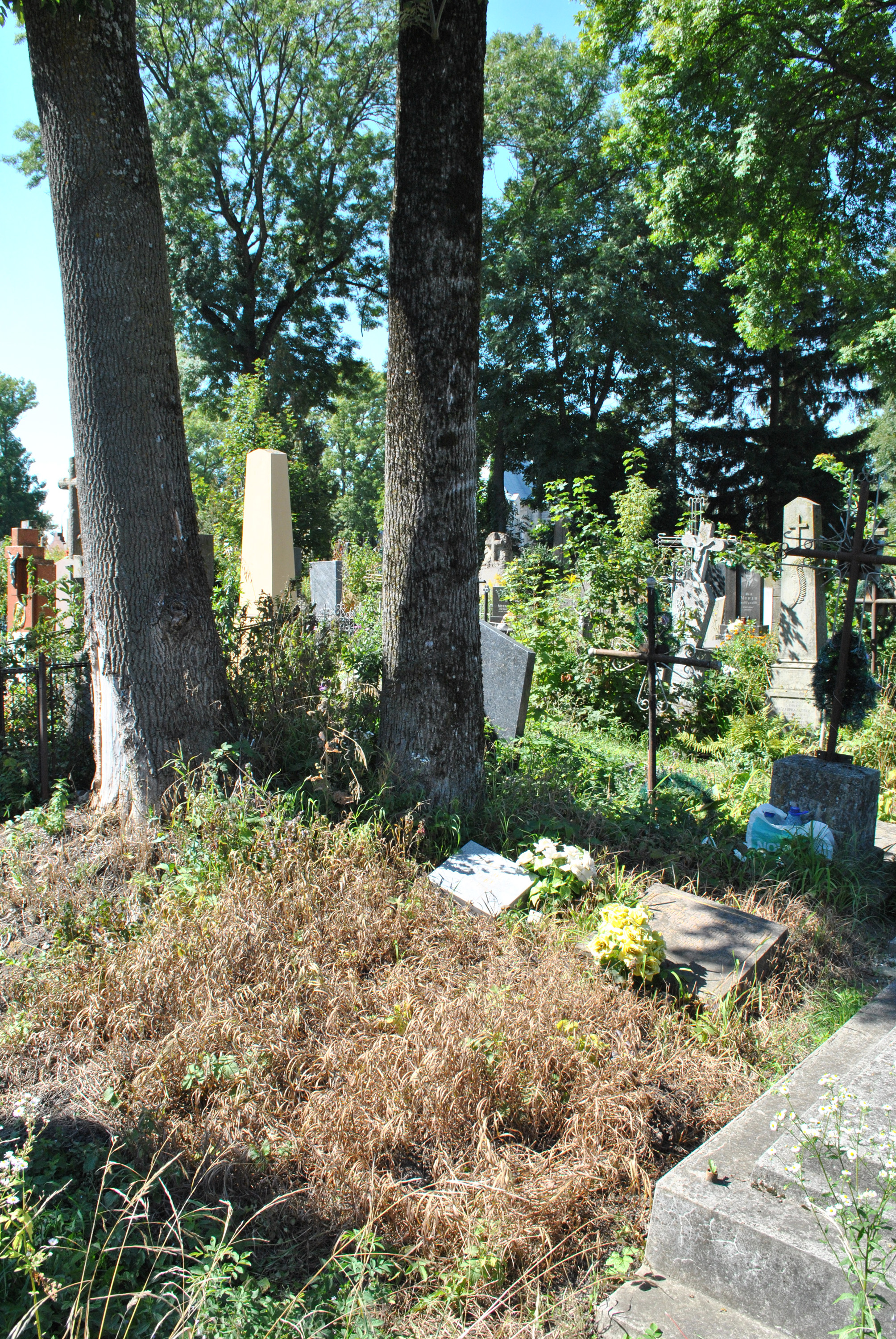 Могили артисток «Тернопільських театральних вечорів» Теодозії Бенцалевої та Катерини Рубчакової на Микулинецькому цвинтарі в Тернополі.